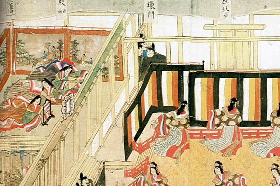 『年中行事絵巻』巻五「内宴」に描かれる綾綺殿の軟障（左）と幔（右）